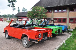 Voiture KARENJY MAZANA - Madagascar